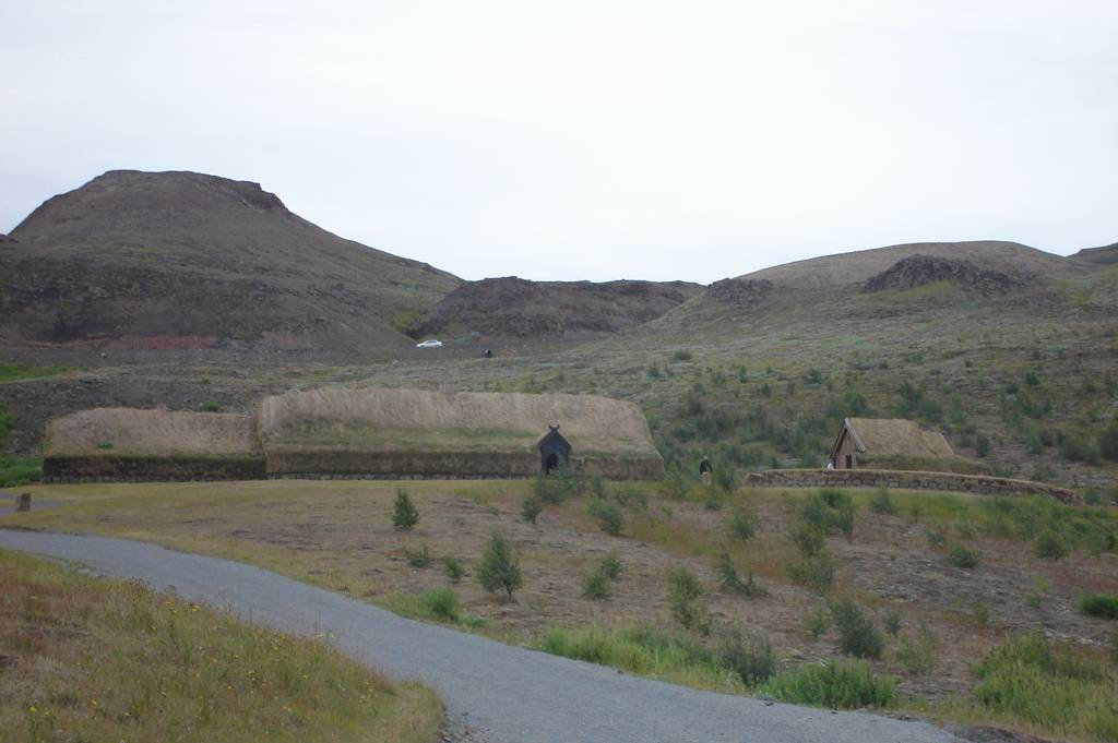 Alle drei Gebäude des rekonstruierten Hofes "Stöng".